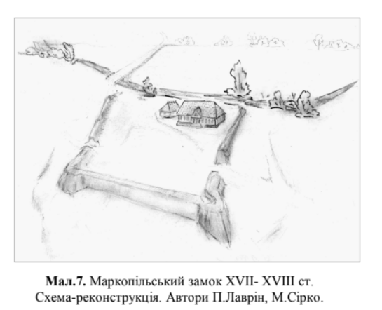 Маркопільський замок ХVI-XVII cт.